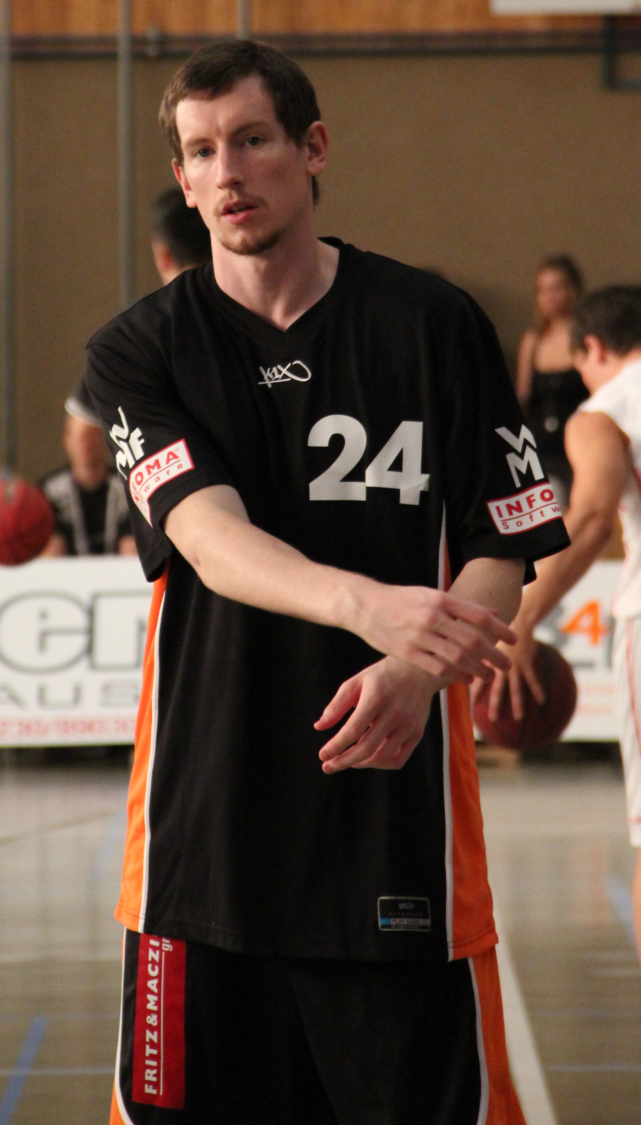 Matt Howard im Trikot von ratiopharm ulm bei einem Testspiel gegen BG Leitershofen zur Saison 2013/14